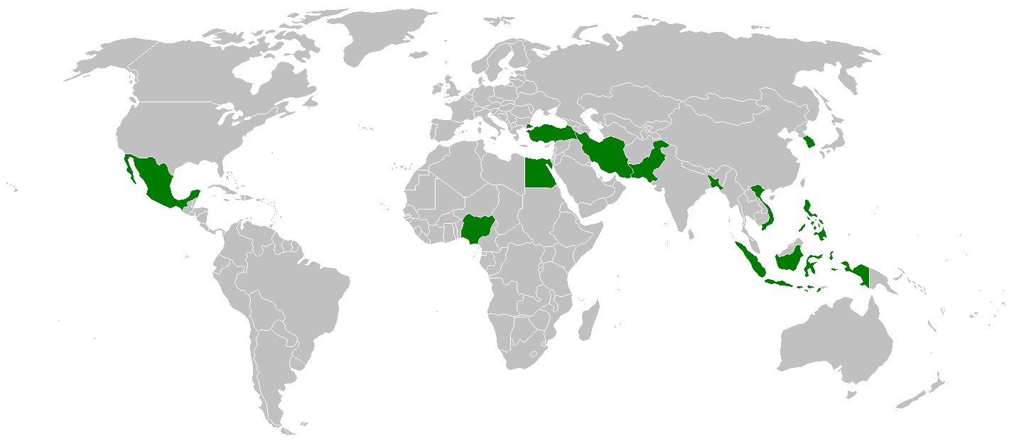 next eleven nations